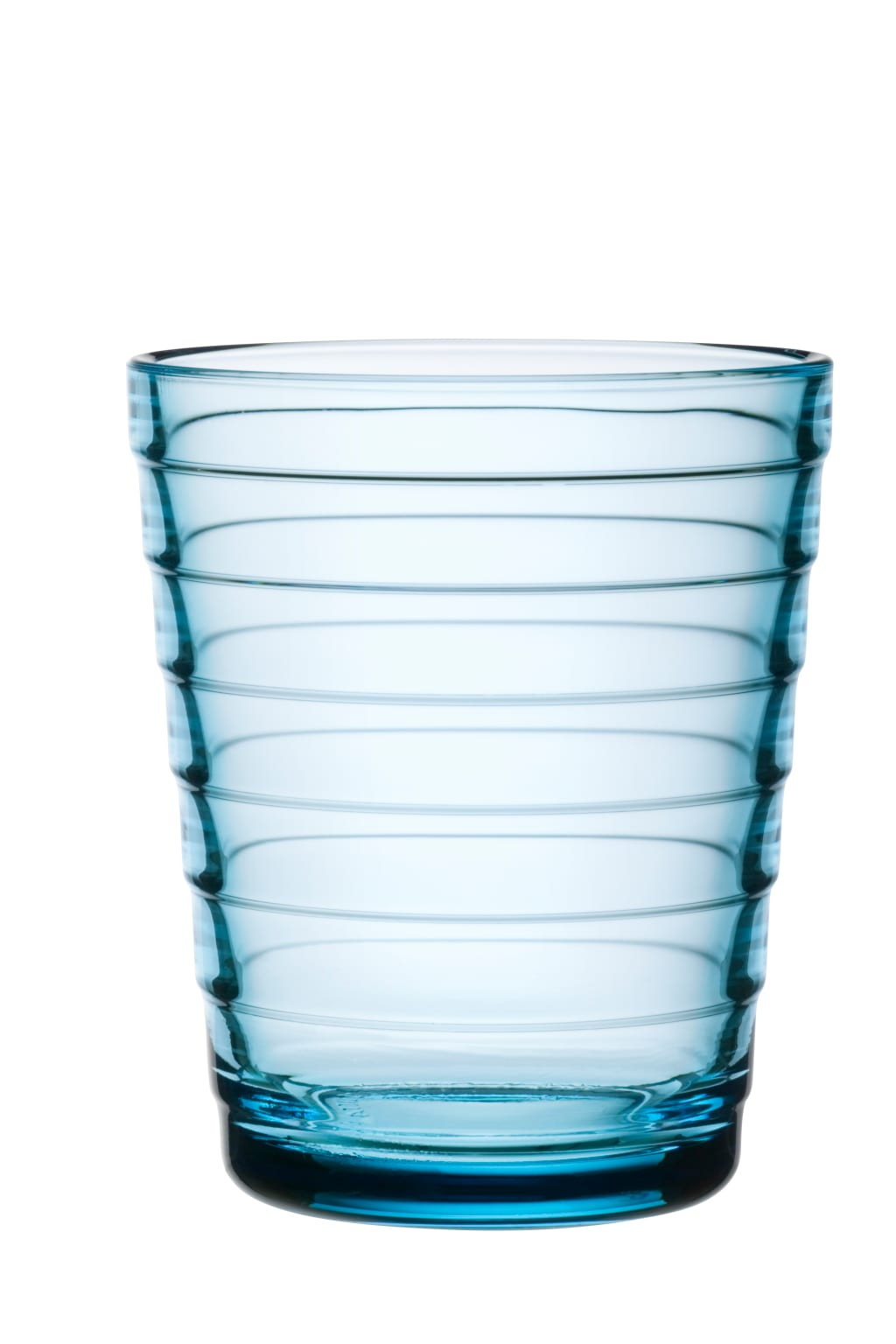 Edalontzi hau masa produkzio bat bilatzen zuen lehiaketa batentzako diseinatu zuen. Irabazi zuen eta Urrezko Domia eman zioten diseinuagatik.